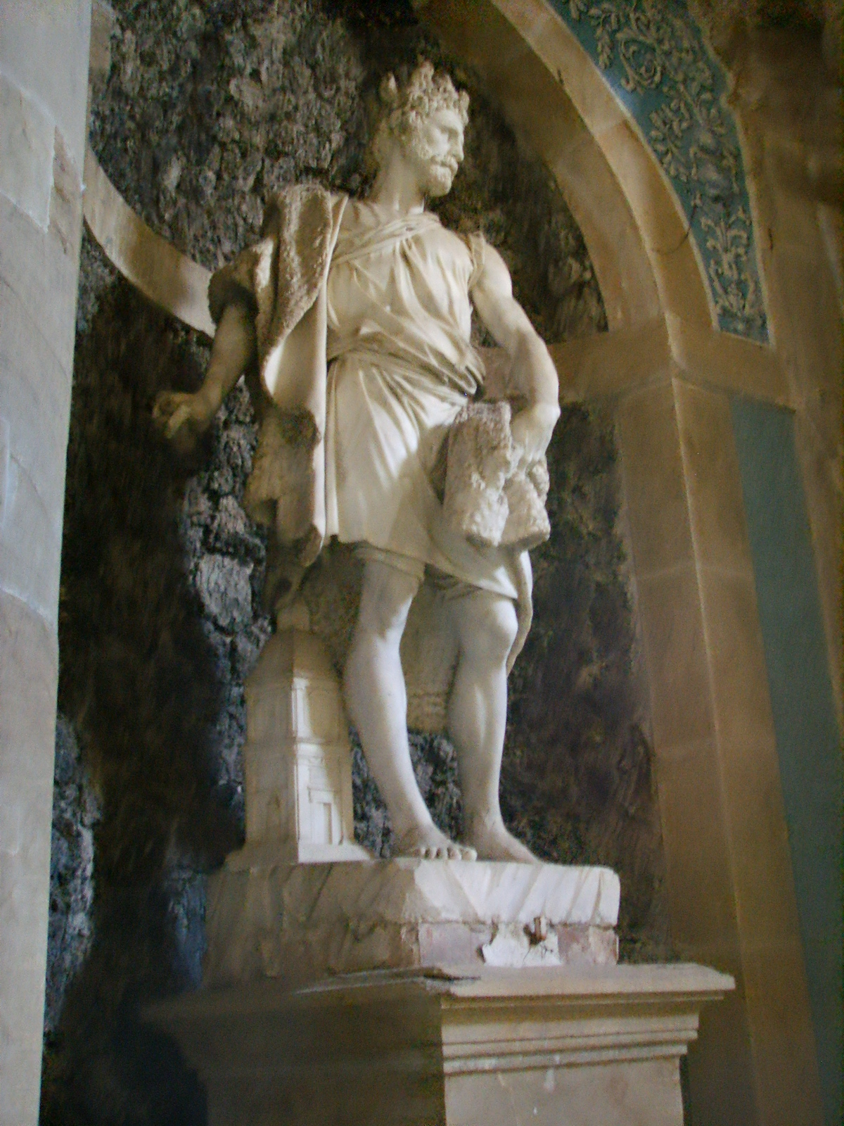 Grotta del Mosè nel cortile di Palazzo Pitti a Firenze. Una delle quattro statue rappresentanti Le Virtù del Principe secondo un impianto allegorico ideato da Francesco Rondinelli (erudito e bibliotecario dei granduchi): 1. La Carità, di Agostino Ubaldini, 1623; 2. L'Imperio, di Domenico Pieratti, 1635-36; 3. Lo Zelo, di Domenico Pieratti, 1635-36; 4. La Legge, di Antonio Novelli, 1635.